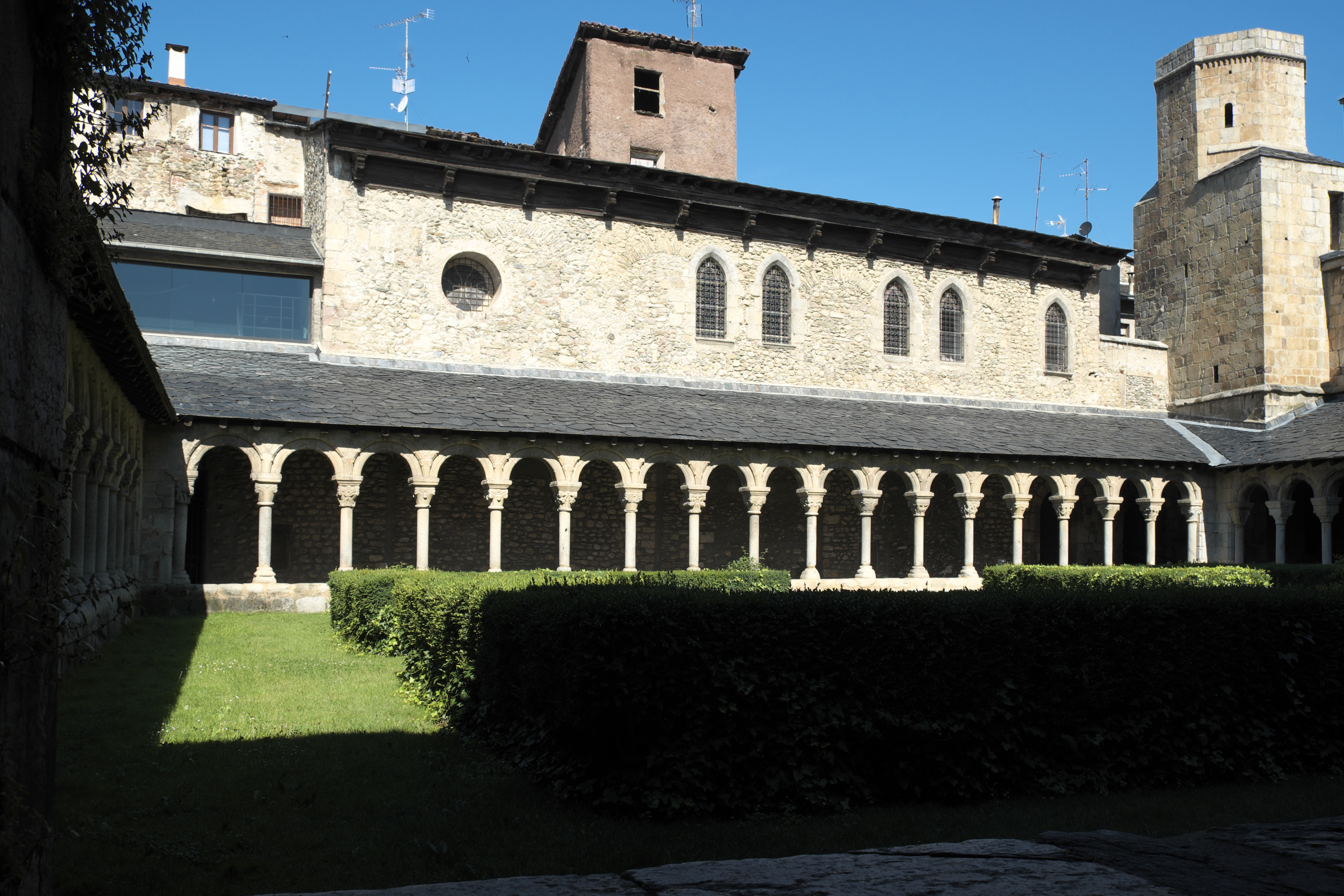 Kreuzgang der Kathedrale Santa María in La Seu d’Urgell in der Provinz Lleida (Katalonien/Spanien)